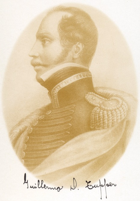 Guillermo Tupper nació en la Isla Guernesey, Inglaterra, el 28 de abril de 1800. Murió masacrado el 17 de abril de 1830 en la Batalla de Lircay, a la edad de 30 años.